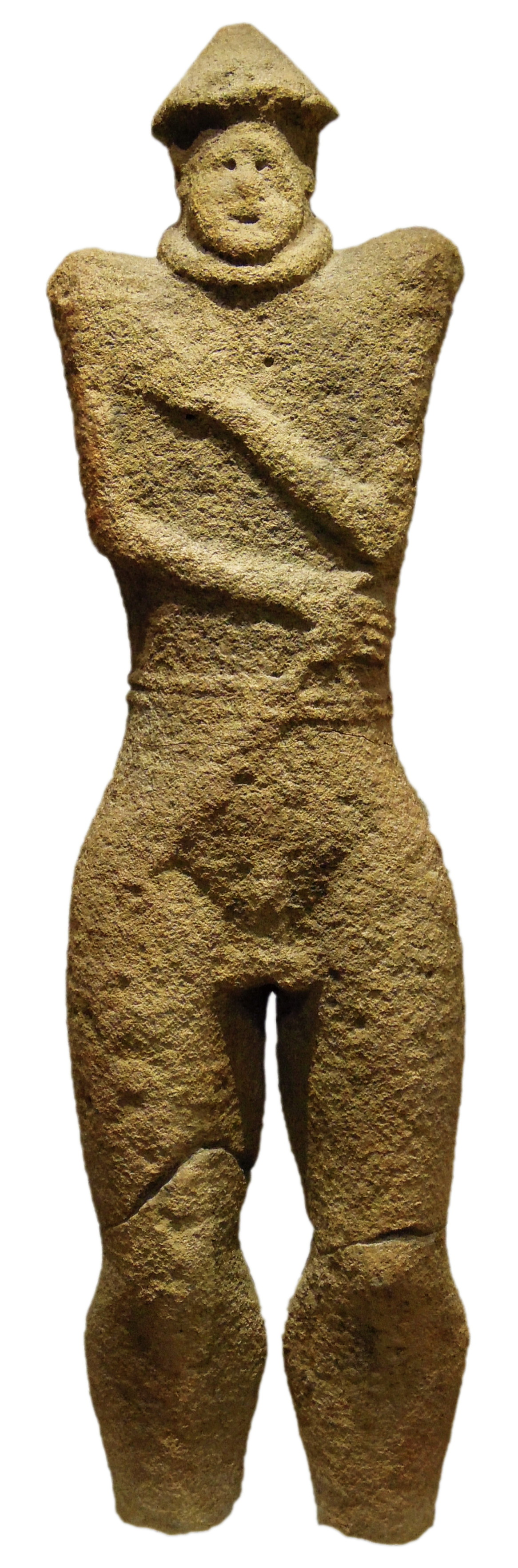 Steinstele Hirschlanden bei Leonberg